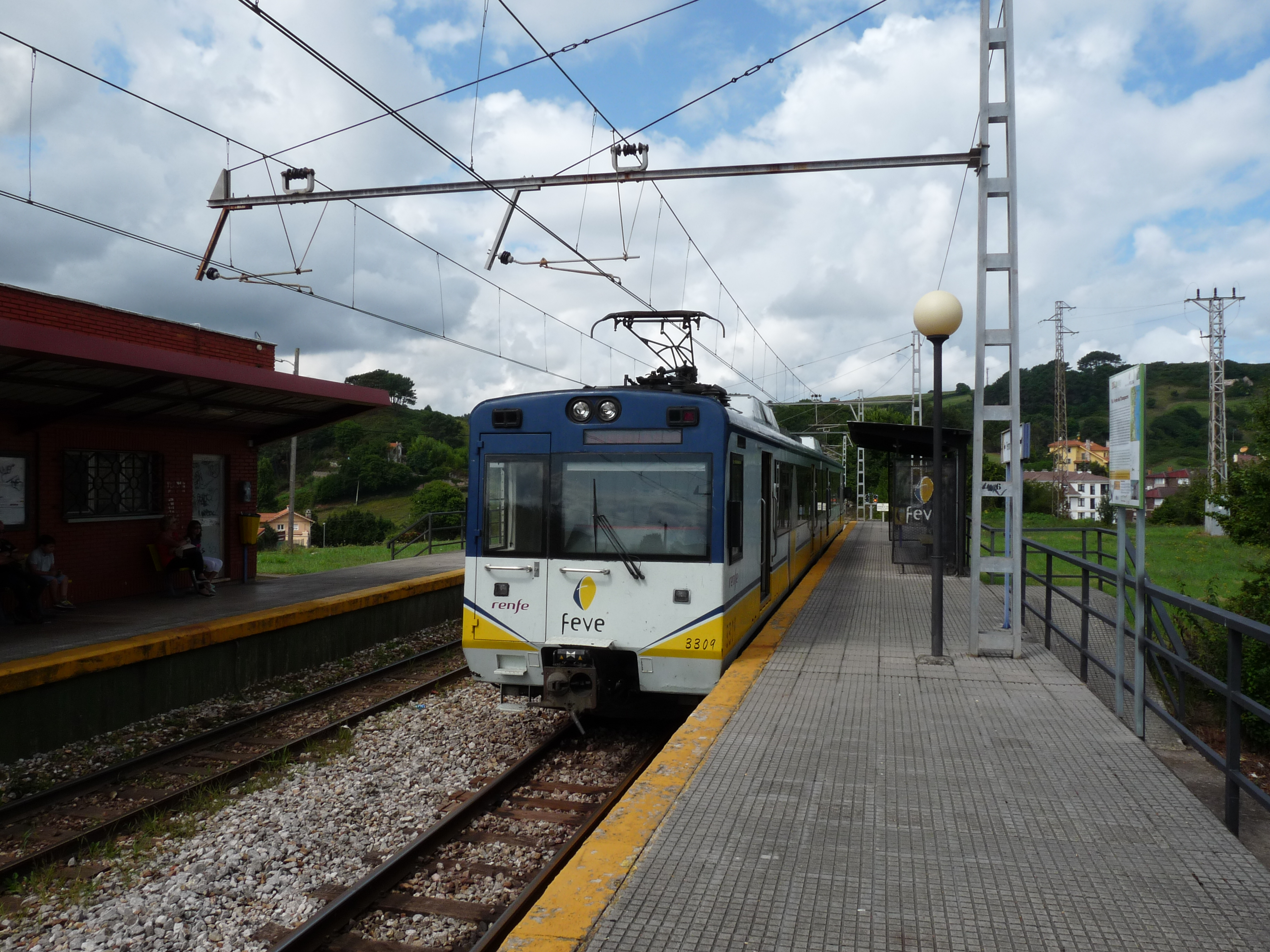 Perlora station langs de kust